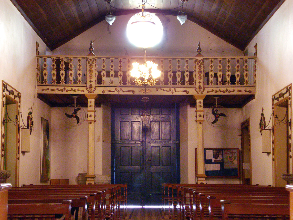 Interior da Igreja Bom Jesus (1754) em Triunfo, Rio Grande do Sul, Brasil. Vista do coro à entrada.